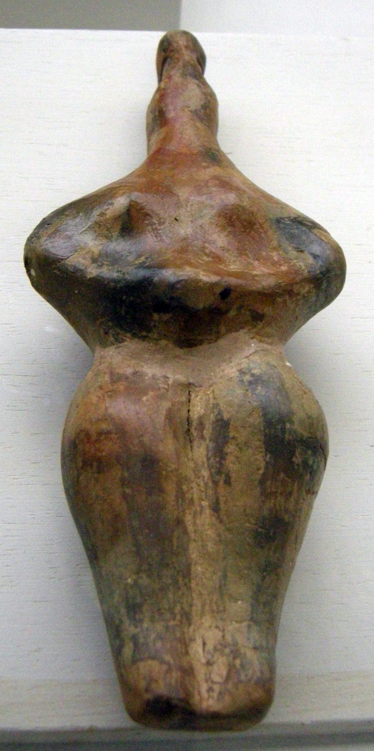 Archeologico firenze, statuetta idolo in terracotta, 5250-5000 a.c., da hacilar (turchia)